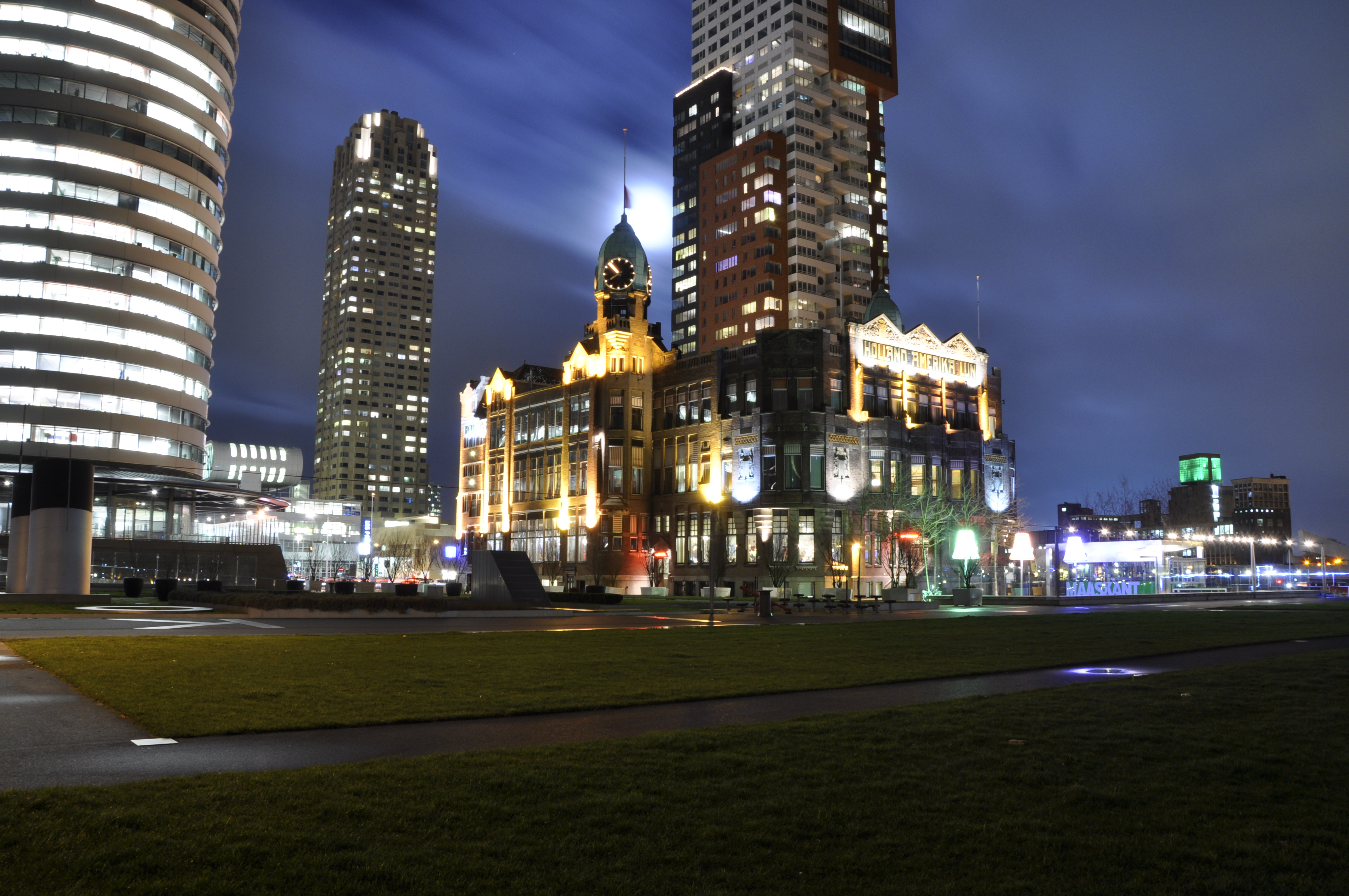 Wilhelminapier